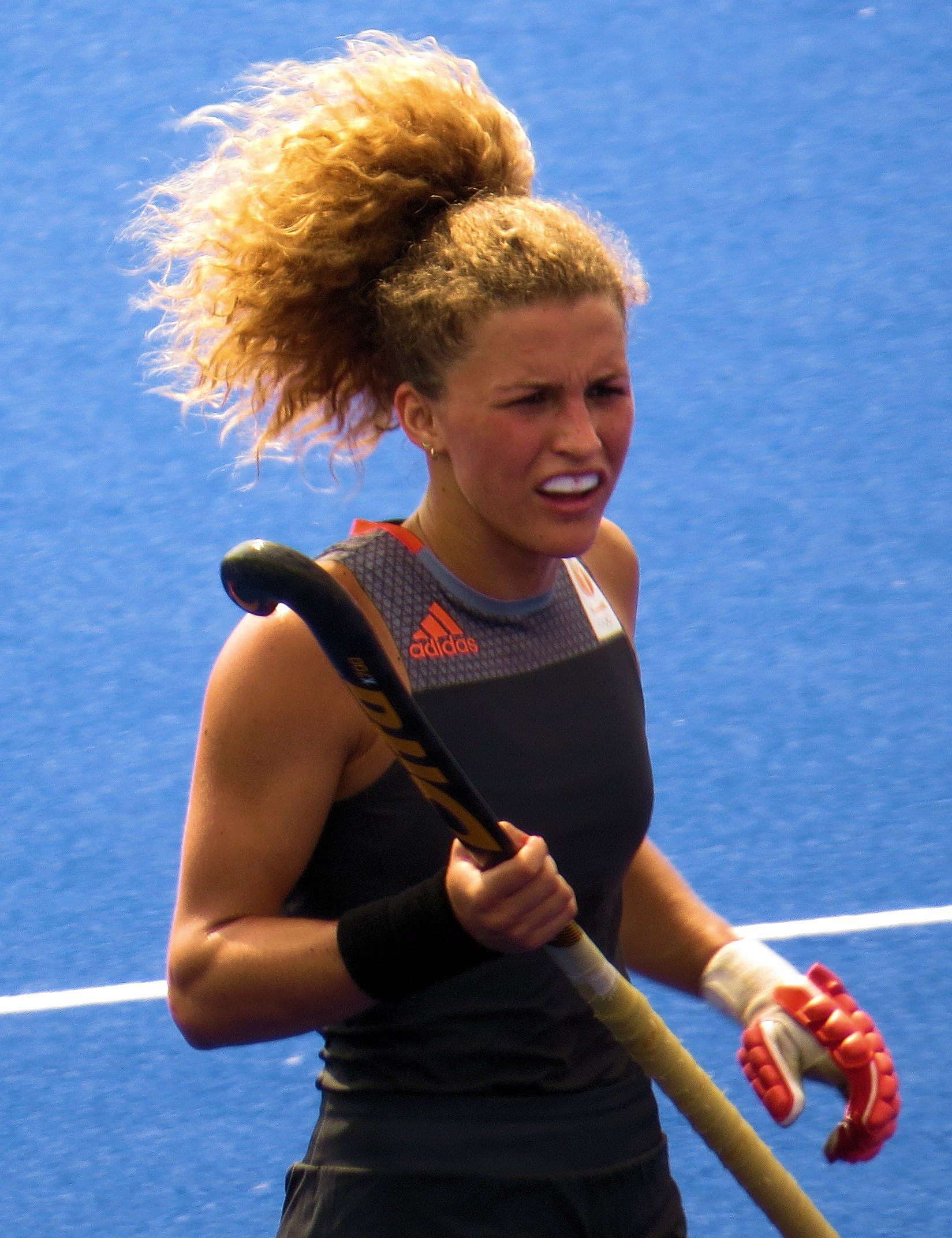 Rio 2016.Hóquei na grama. Feminino. Holanda x Espanha. sx 81